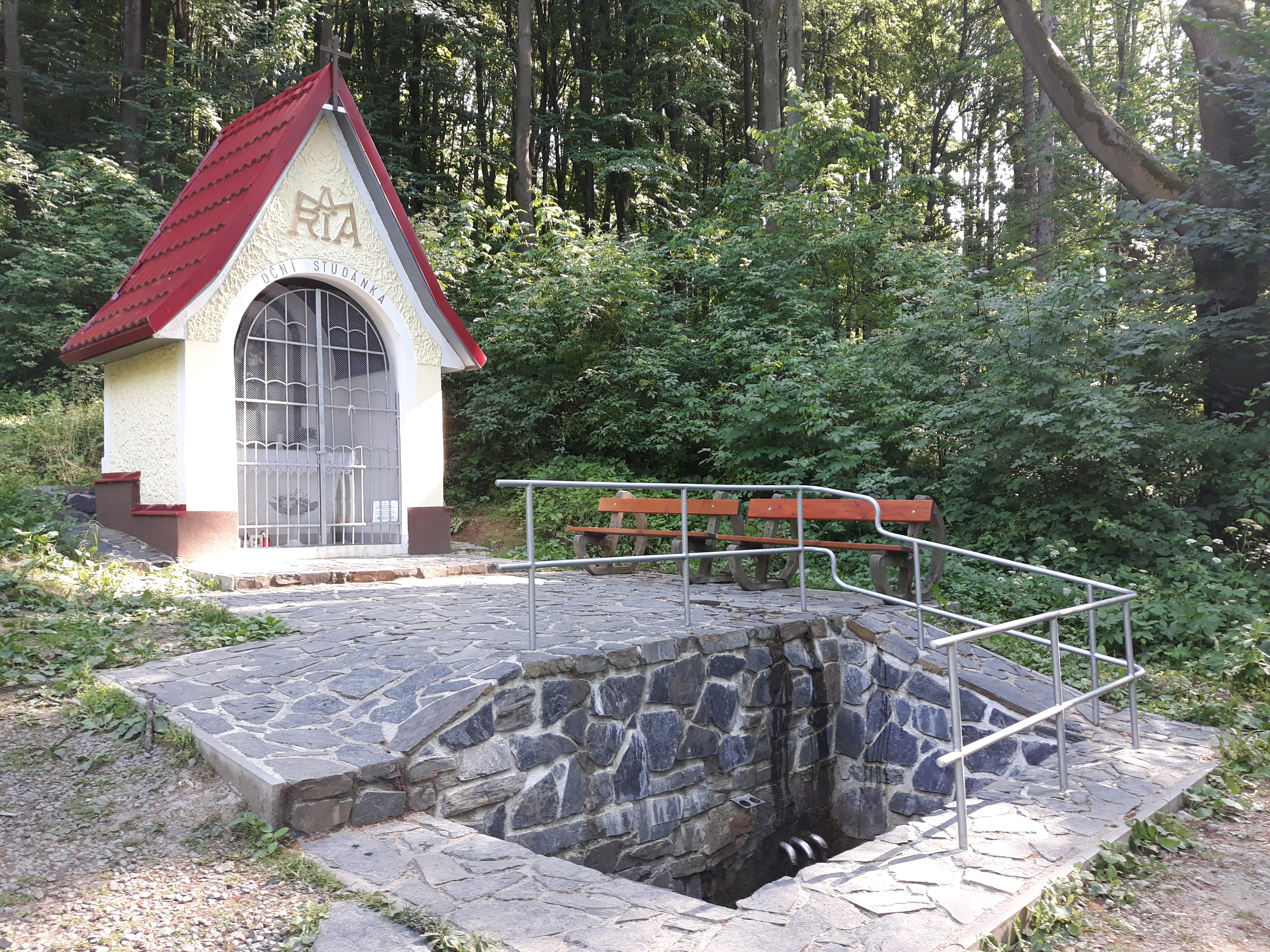 Oční studánka s kapličkou Panny Marie Svatohostýnské